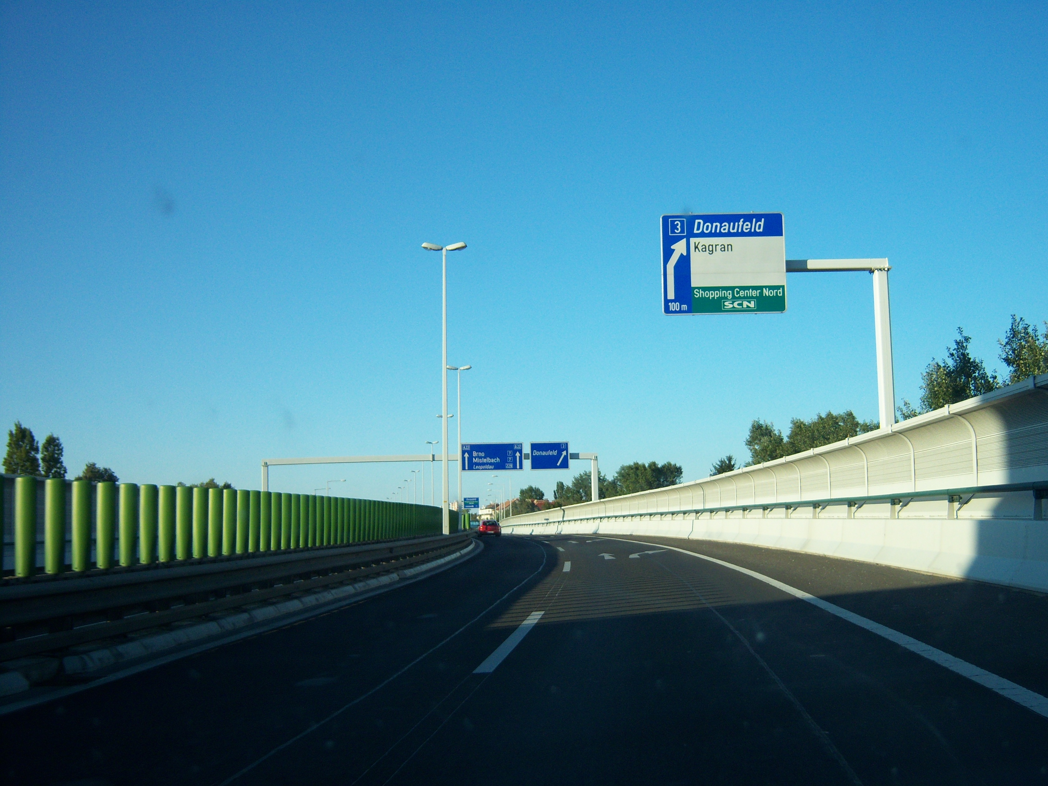 A22-Zubringer Nordbrücke Richtung Brünner Straße an der Anschlussstelle Donaufeld